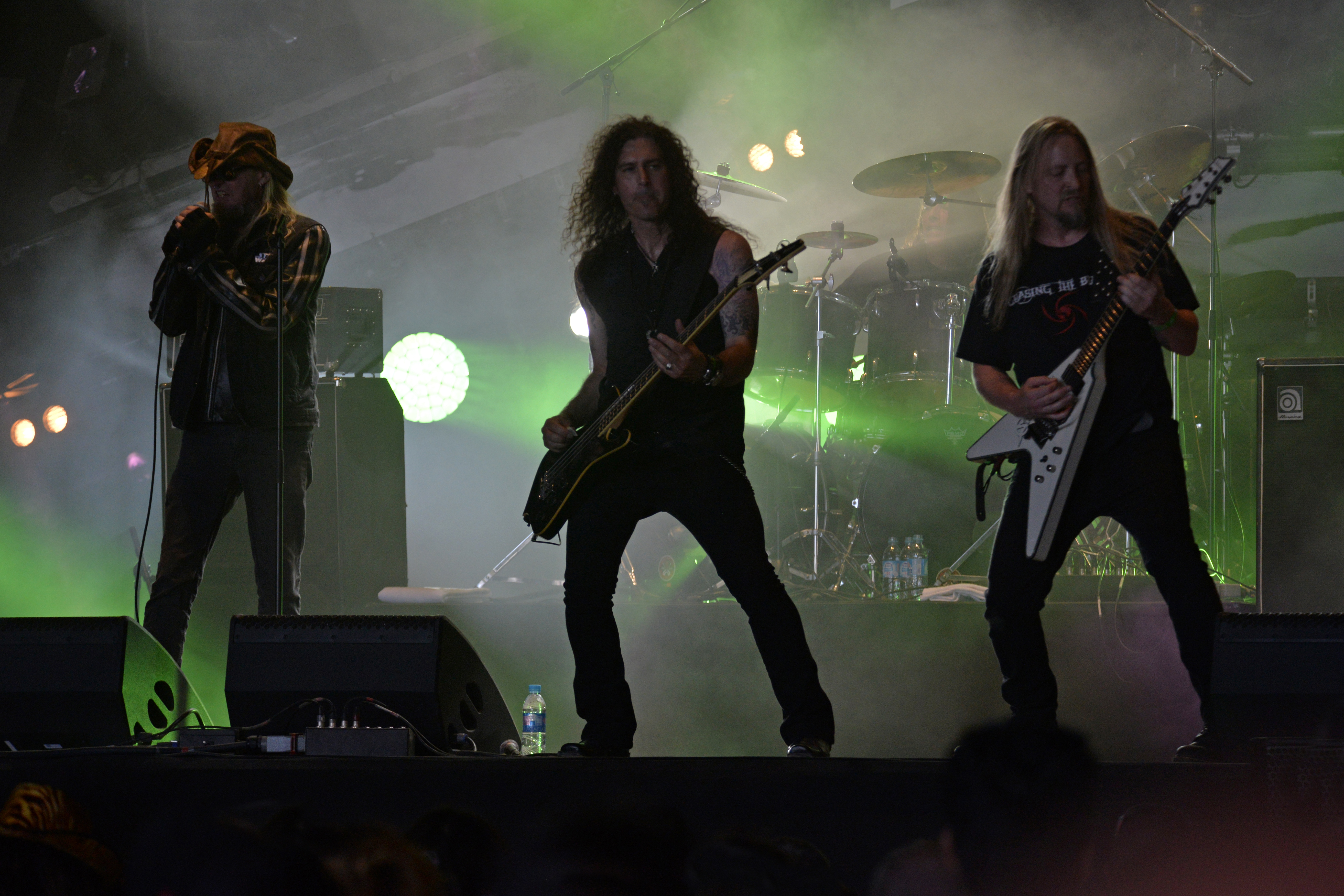 Concert du groupe de métal américain Sanctuary au Hellfest 2017.